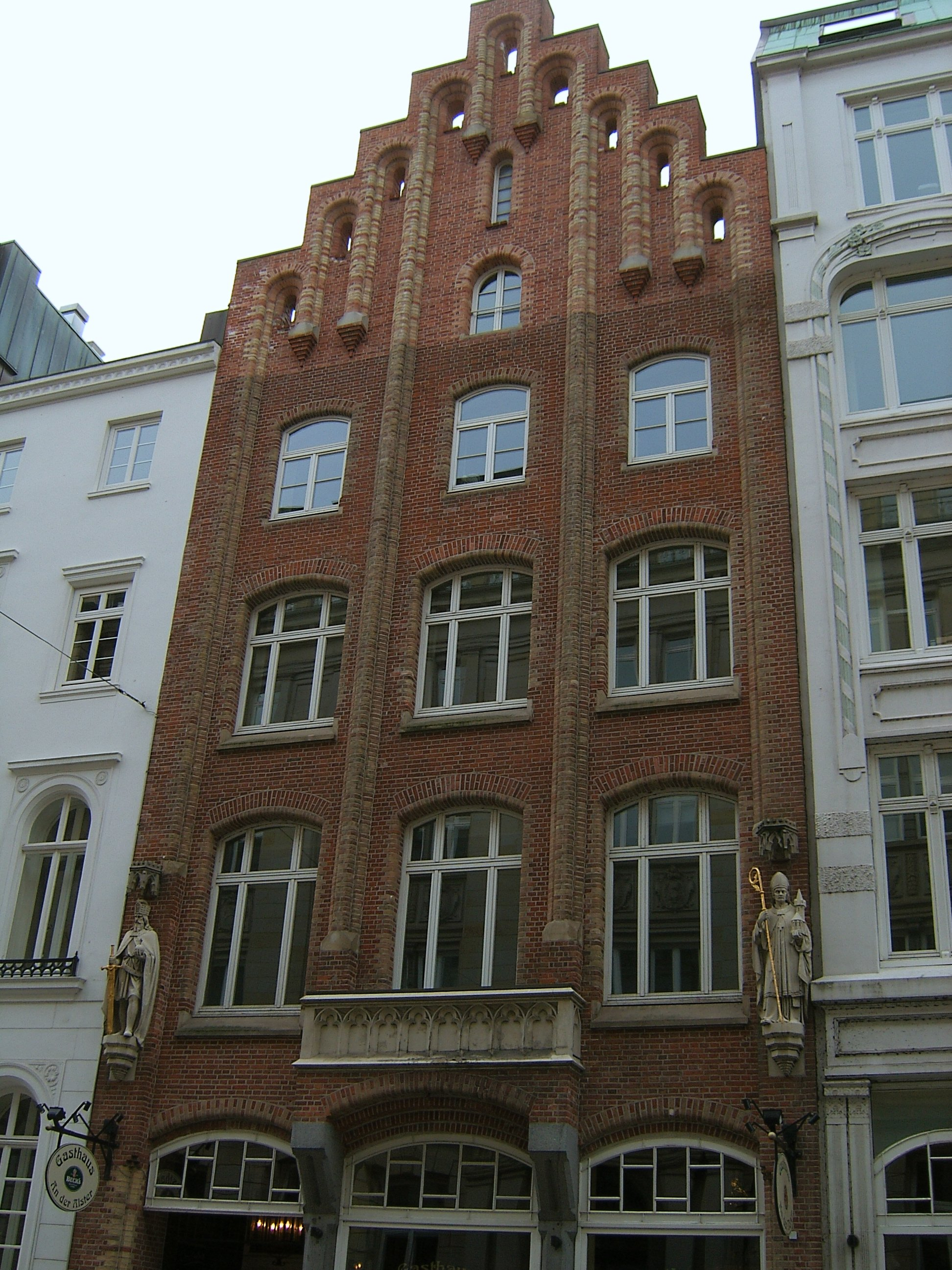 Das Haus Ferdinandstraße 65 in Hamburg-Altstadt wurde 1843/44 von Theodor Bühlau für den Rechtsanwalt Johann Friedrich Voigt im Stil der norddeutschen Backsteingotik erbaut. Seitlich des Eingangs befinden sich Statuen des Heiligen Ansgar und Karls des Großen.